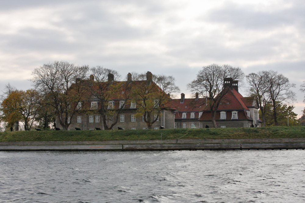 Buildings at Nyholm in Copenhagen, Denmark